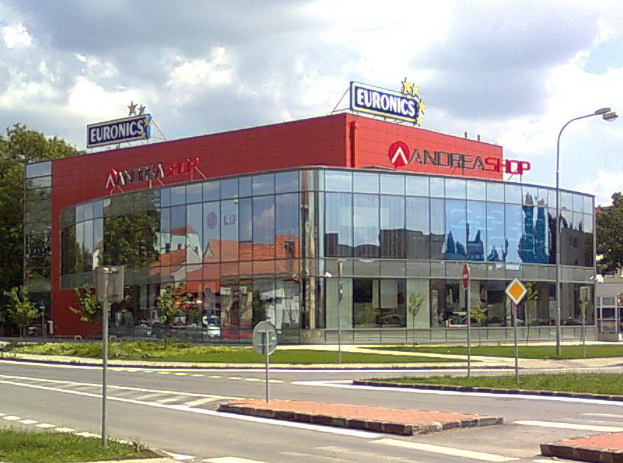 OD elektro Andrea Shop